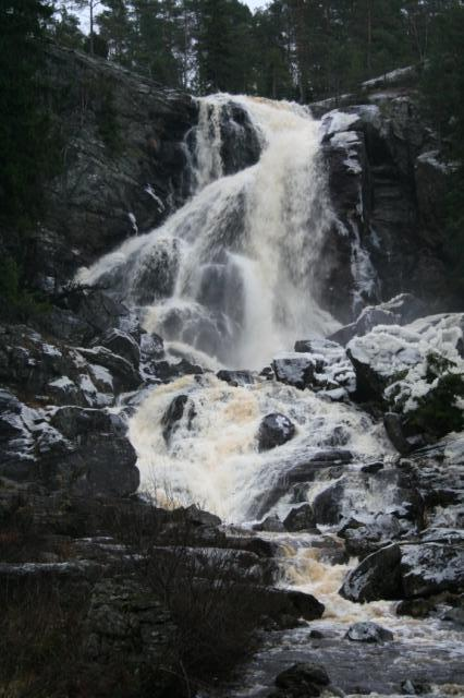 Elgåfossen